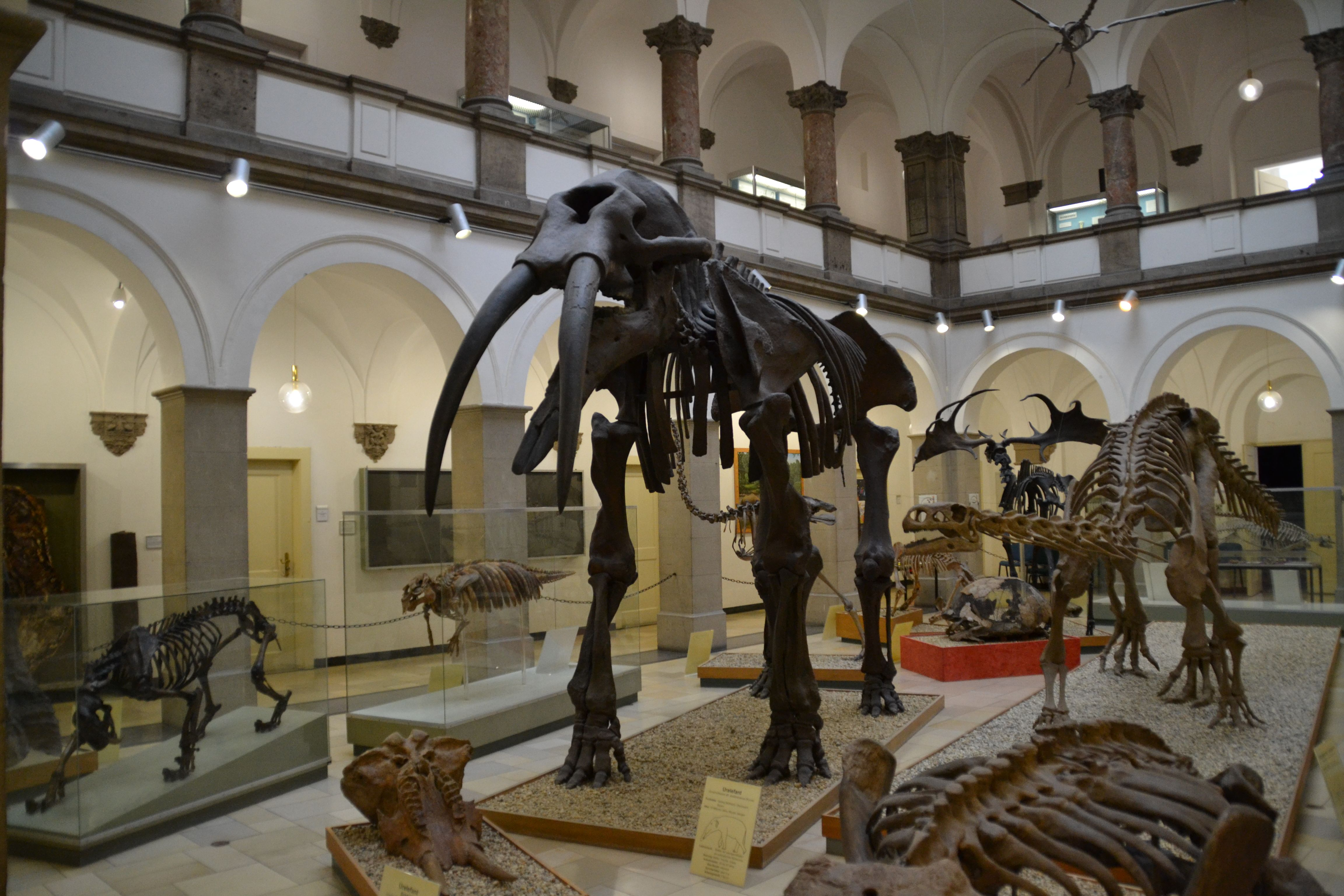 Müncheni Palaeontológiai Múzeum